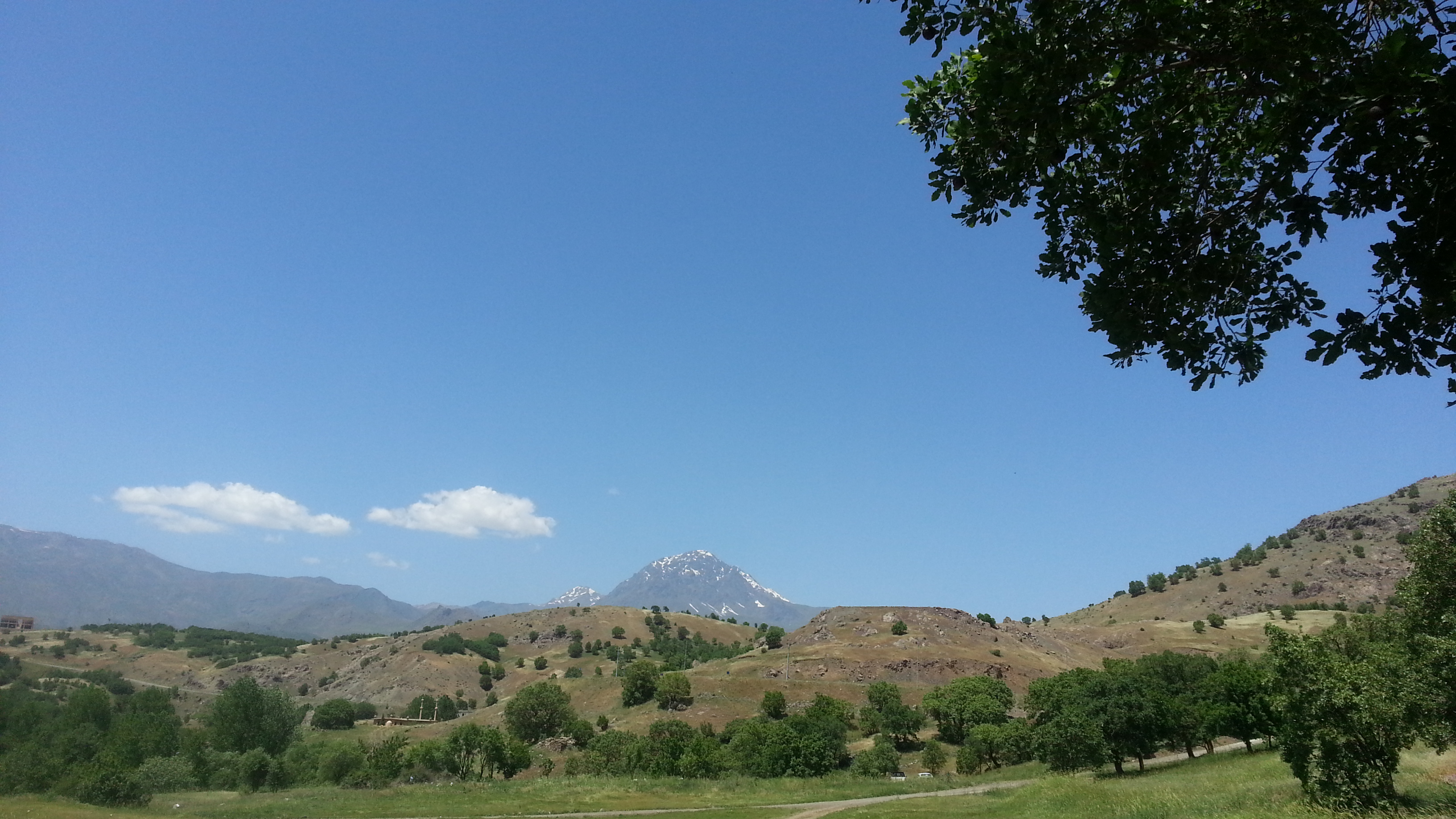 کوردیی ناوەندی: Halgurd Mountain